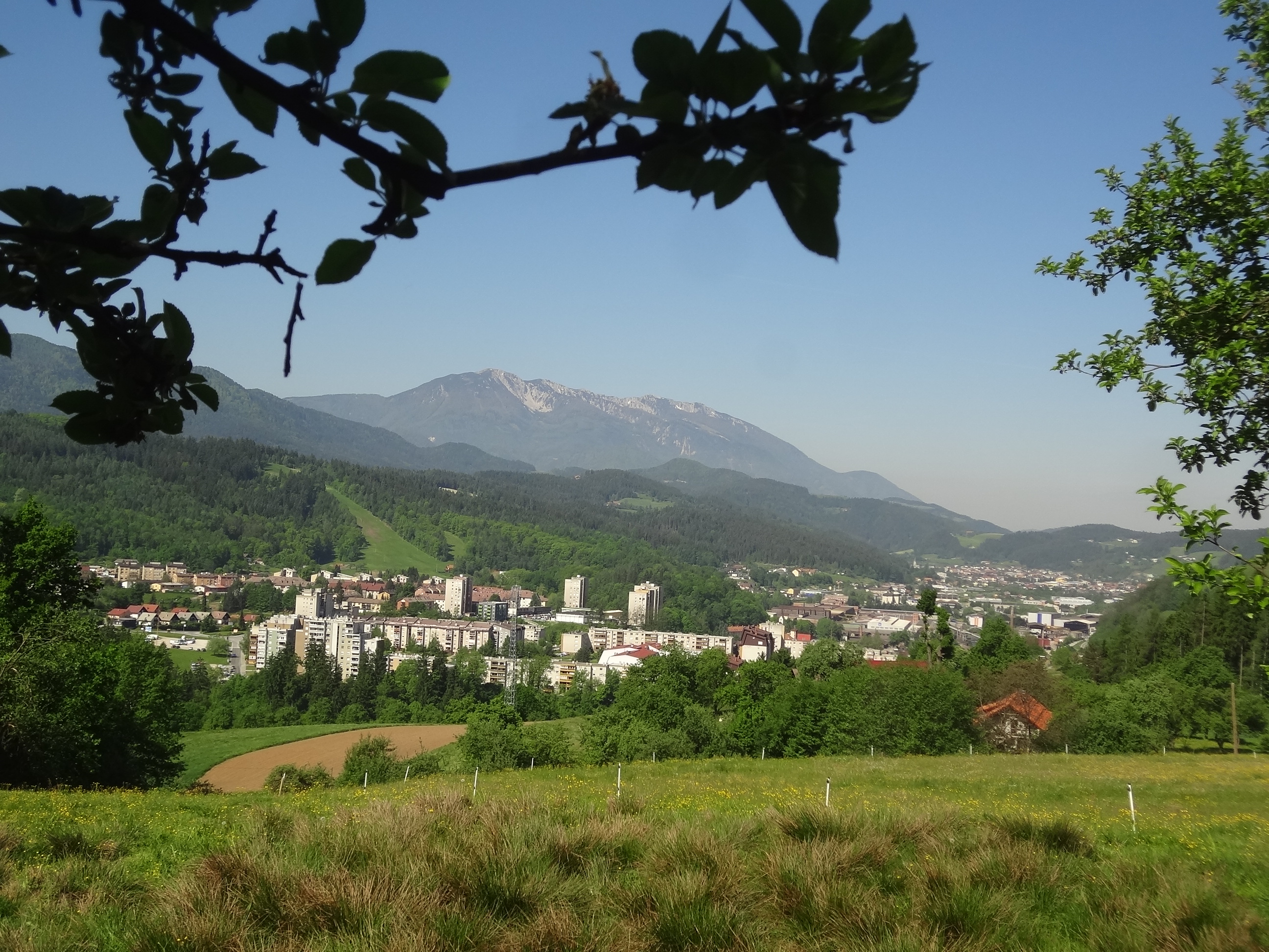 Koroska prestolnica